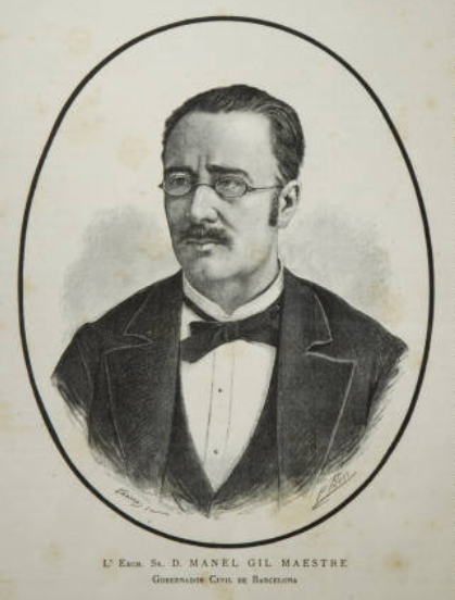 La Ilustració Catalana, número 097. 31 Octubre de 1883, pàg. 309. Sr. D. Manel Gil Maestre, per Pacià Ross.